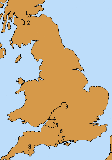 Abona sterioù